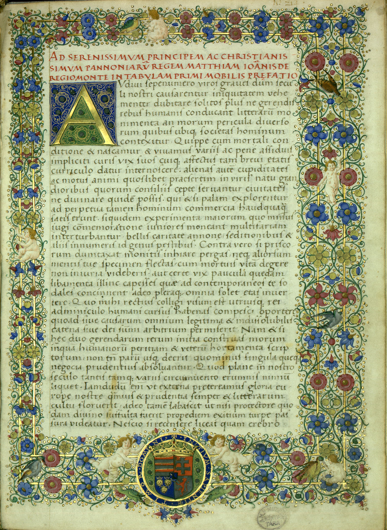 Regiomontanust Vitéz János hívota meg a pozsonyi egyetemre, aki néhány éven át Mátyás király udvari asztronómusa volt. Az állócsillagok látszólagos mozgásáról írott művét a királynak ajánlotta.